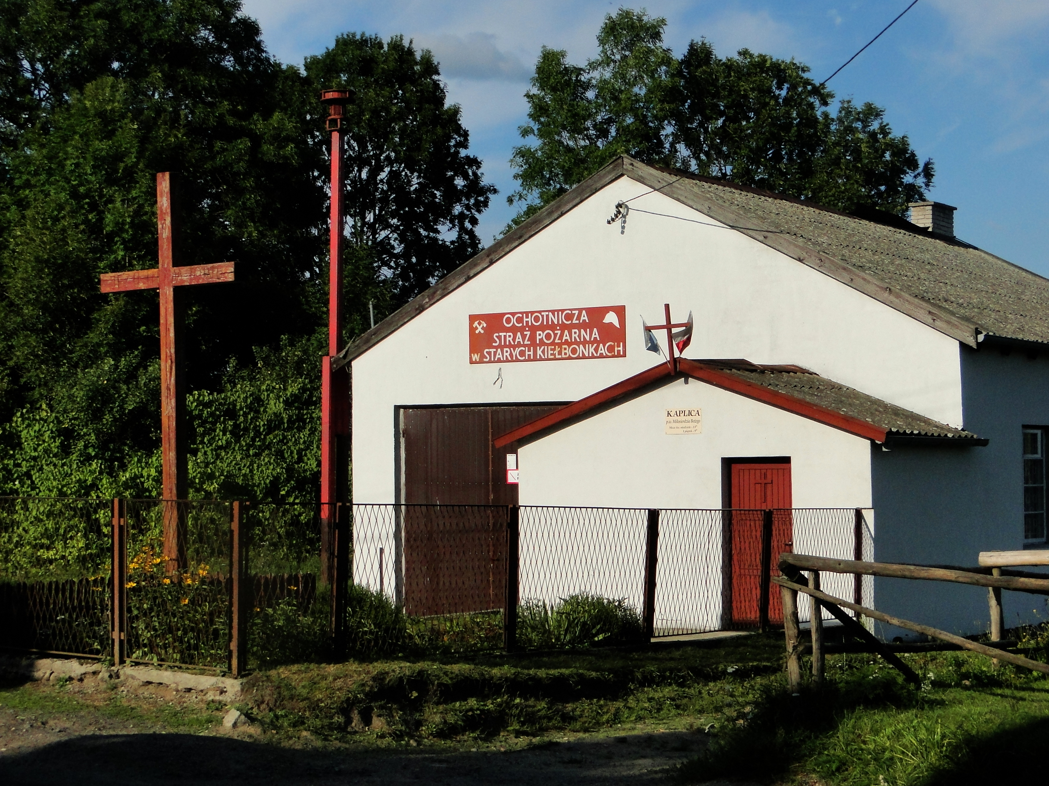 Ochotnicza Straż Pożarna - Volunteer Fire Station, Stare Kiełbonki, Poland